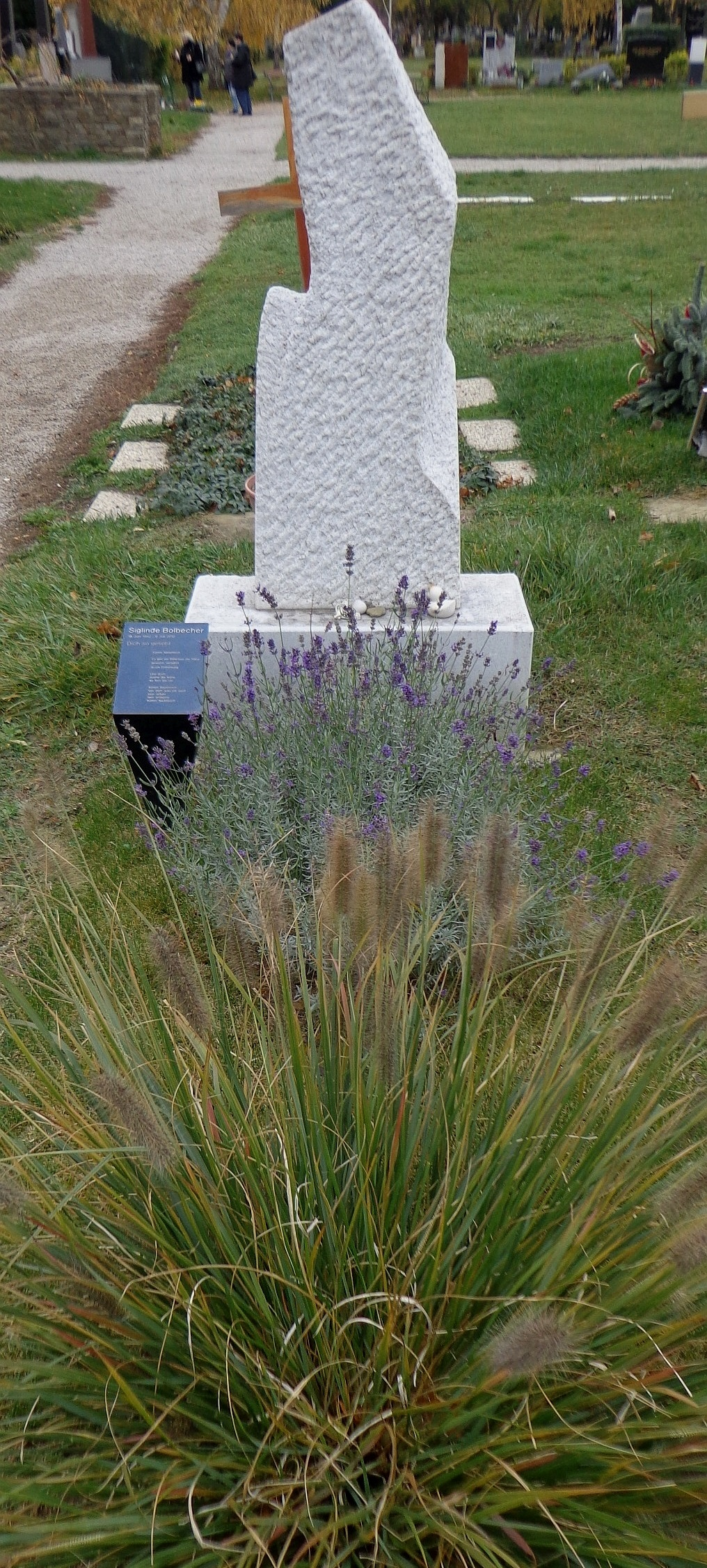 Wiener Zentralfriedhof - Gruppe 40: ehrenhalber gewidmetes Grab von Siglinde Bolbecher